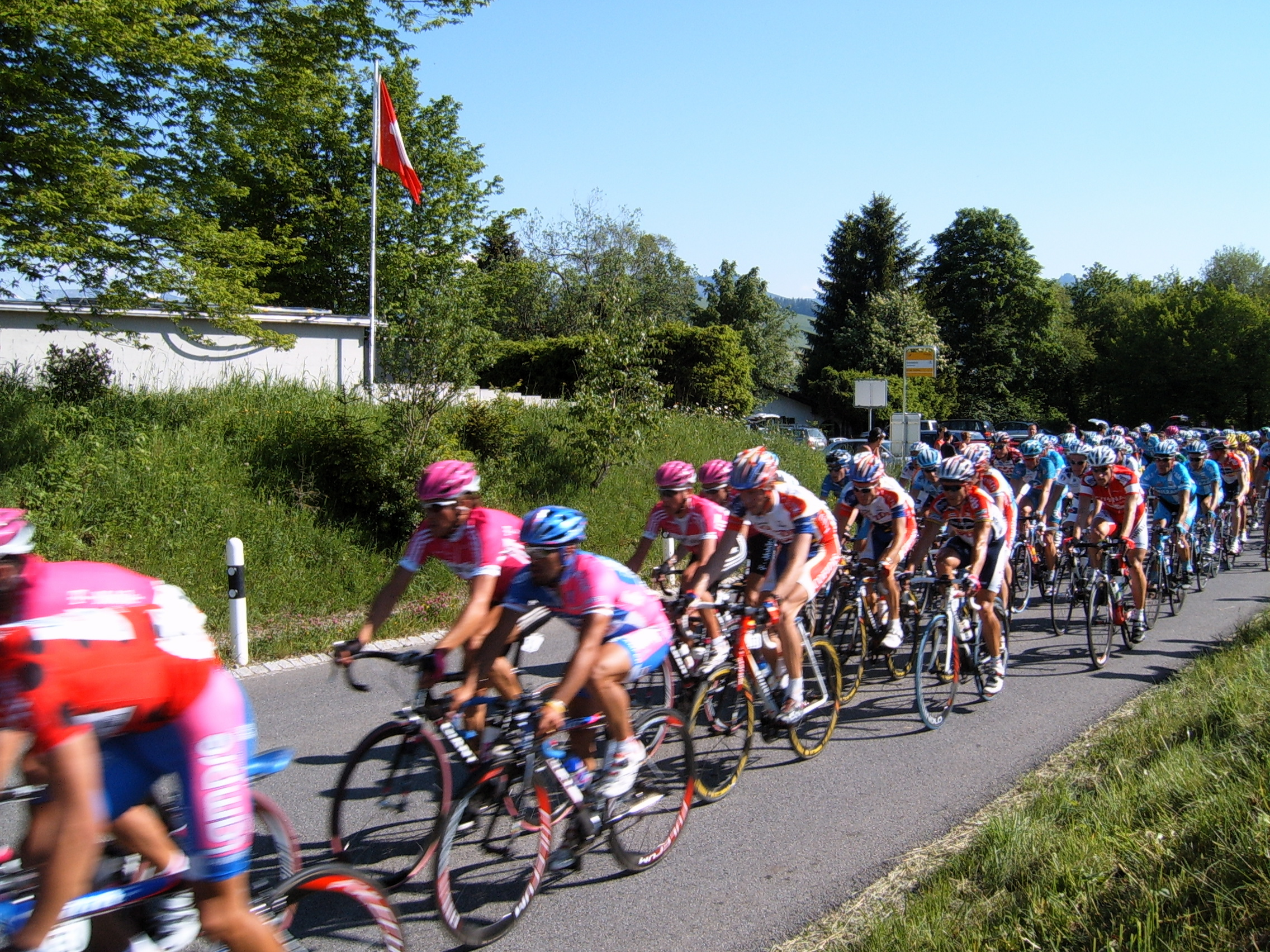 Tour de Suisse 2006, stage 2 (Bremgarten - Einsiedeln), 11 June 2006. Location: Northern shore of Sihlsee.